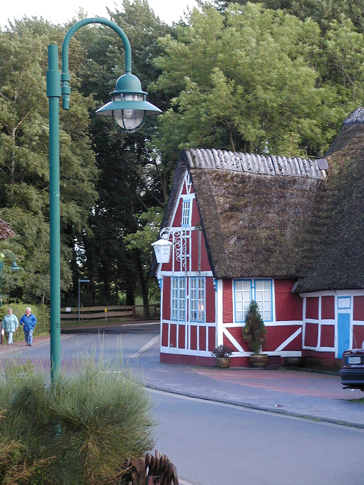 Ein Haus an der Schleuse